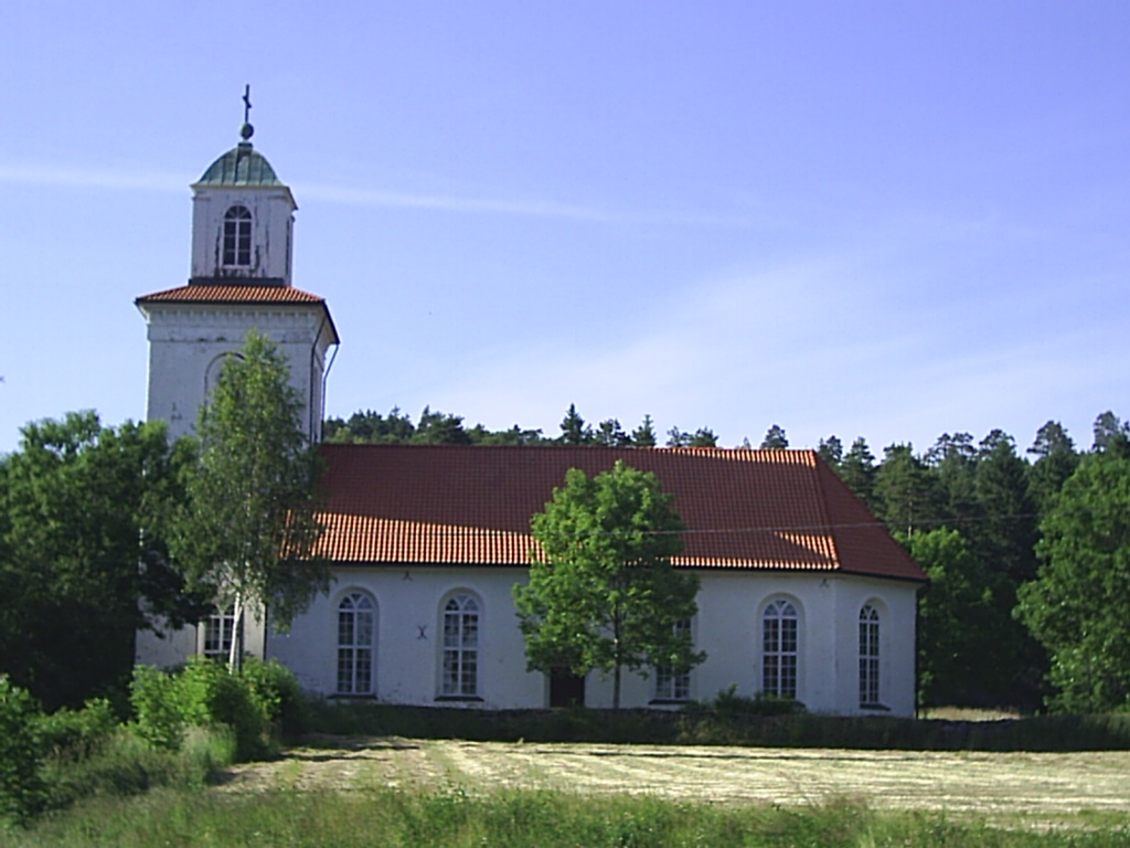 Hogdals kyrka i Hogdal, Strömstads kommun. Fotograf:Tubaist, Sommaren 2005